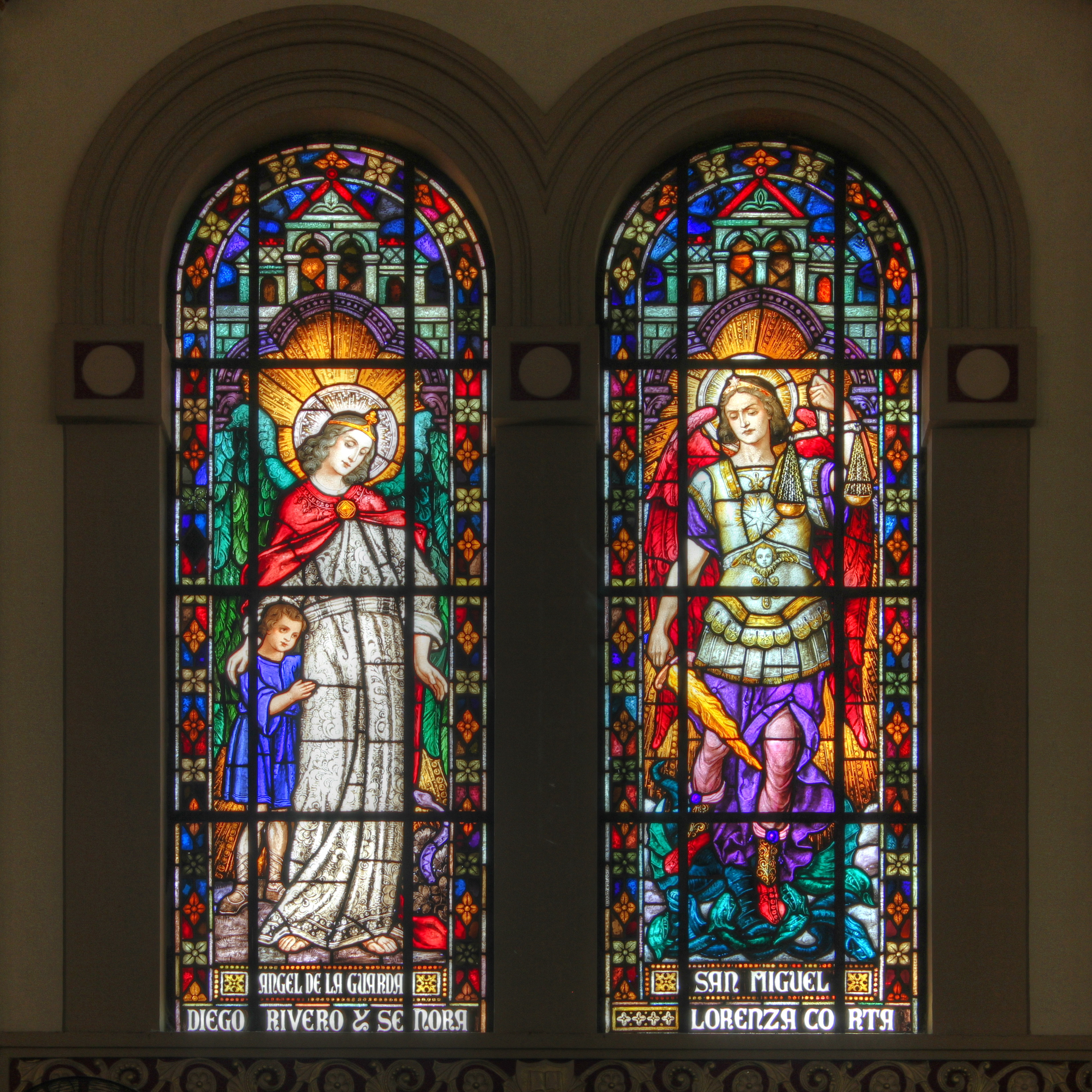 Parroquia Inmaculado Corazón de María. Imagen del Ángel de la Guarda y San Miguel